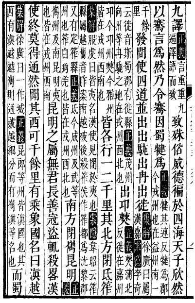 《史記》卷123 大宛列傳 第六十三 83頁